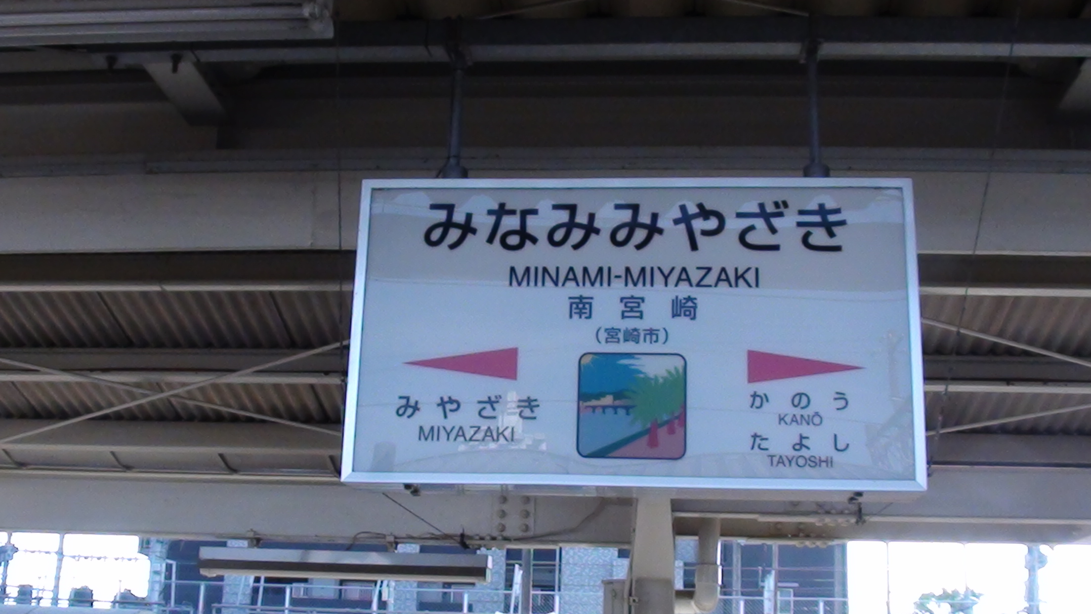 南宮崎駅の駅名標、2018年12月27日撮影